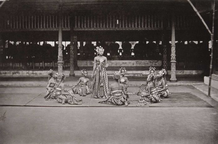 Foto. Bedoyo danseressen aan het hof van de Sultan van Jogjakarta